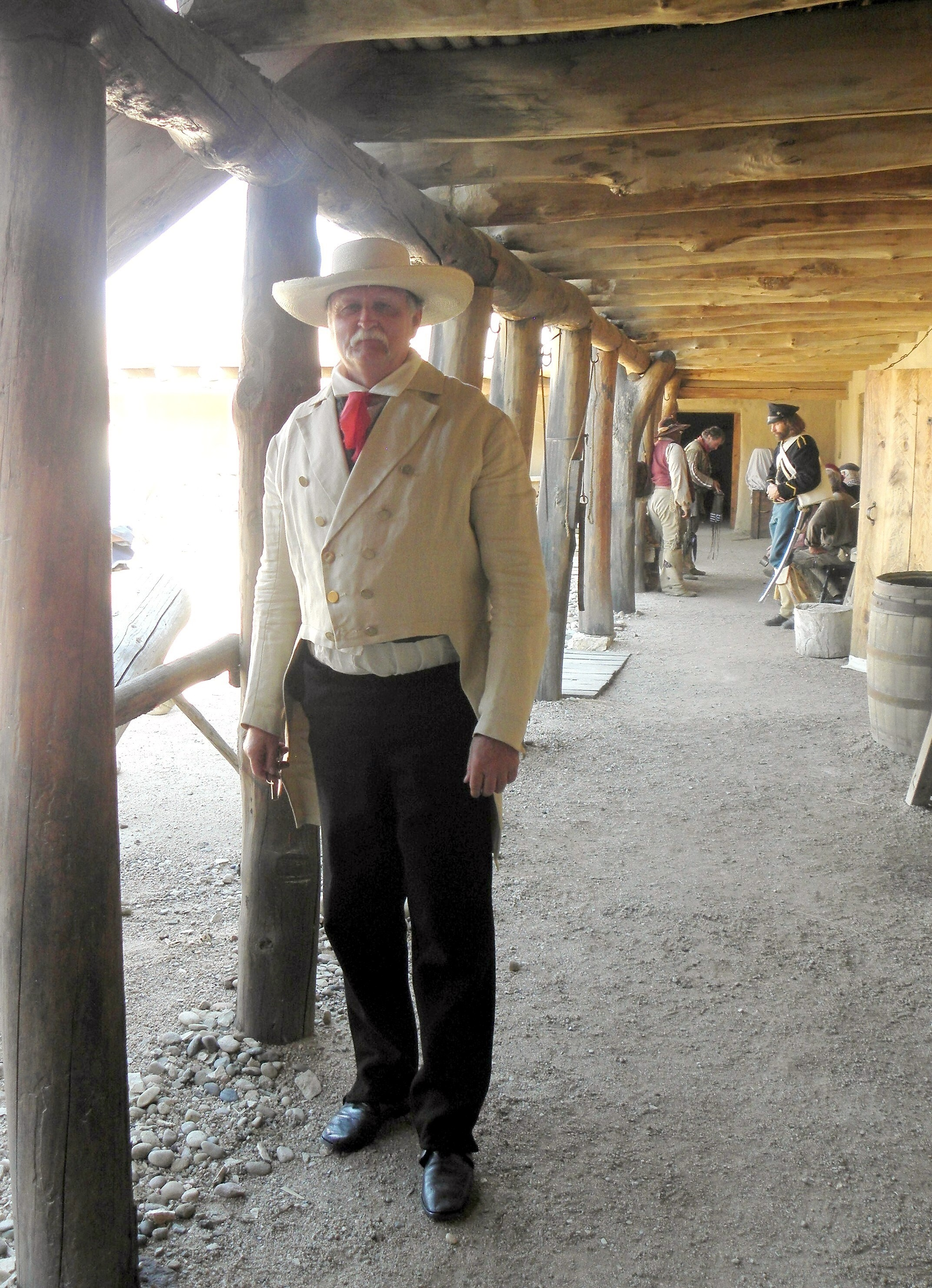 Kuegler als "Chief Trader" in Bent's Old Fort, Colorado, 2016.